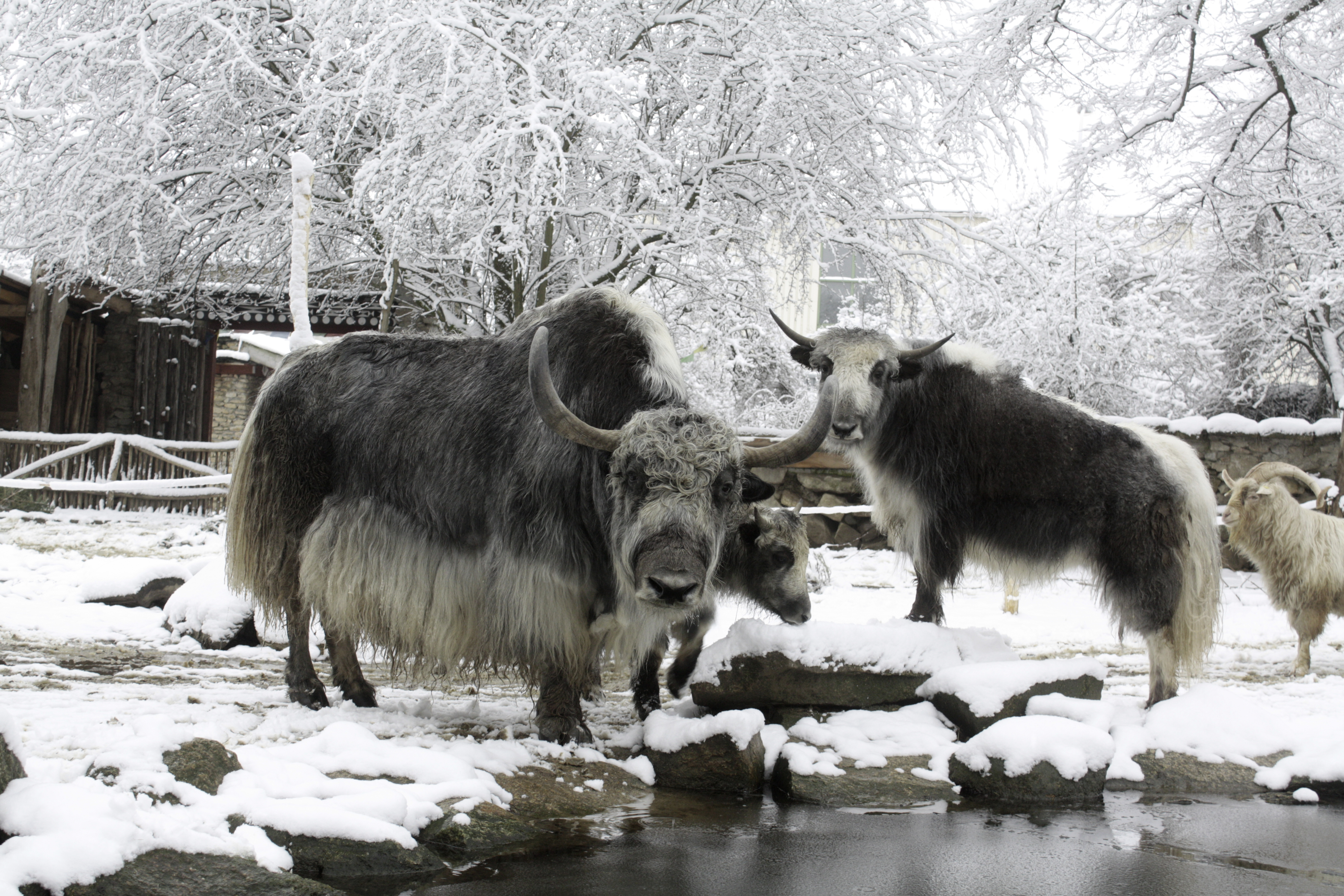 Yaks und Kaschmirziege auf der Tibetanlage im Tierpark Görlitz